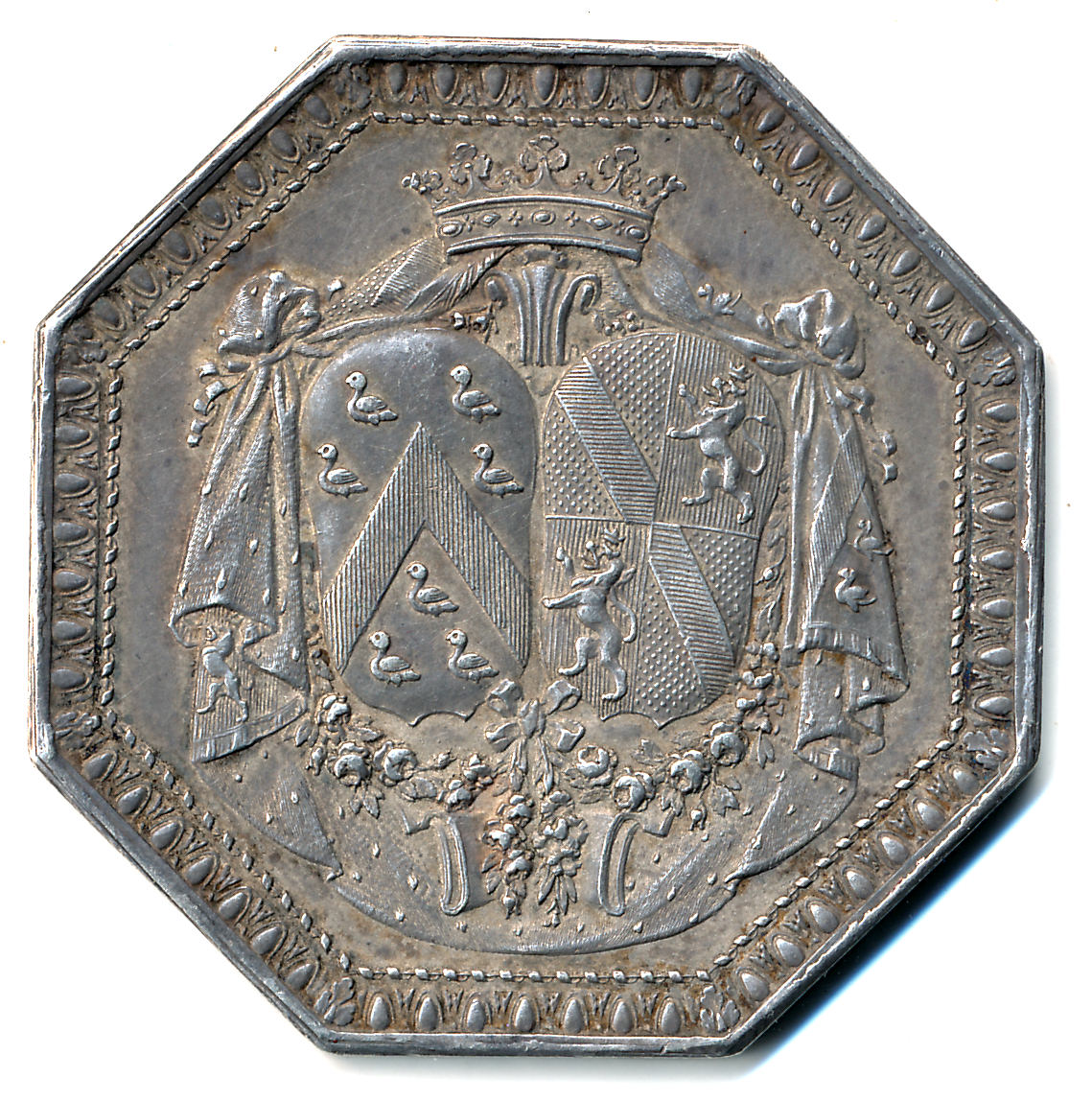 Jeton commémorant le mariage de Louis d’Aumont et Louise-Jeanne de Durfort de Duras en 1747, gravé par Pierre-Joseph Lorthior, 36mm, argent, avers